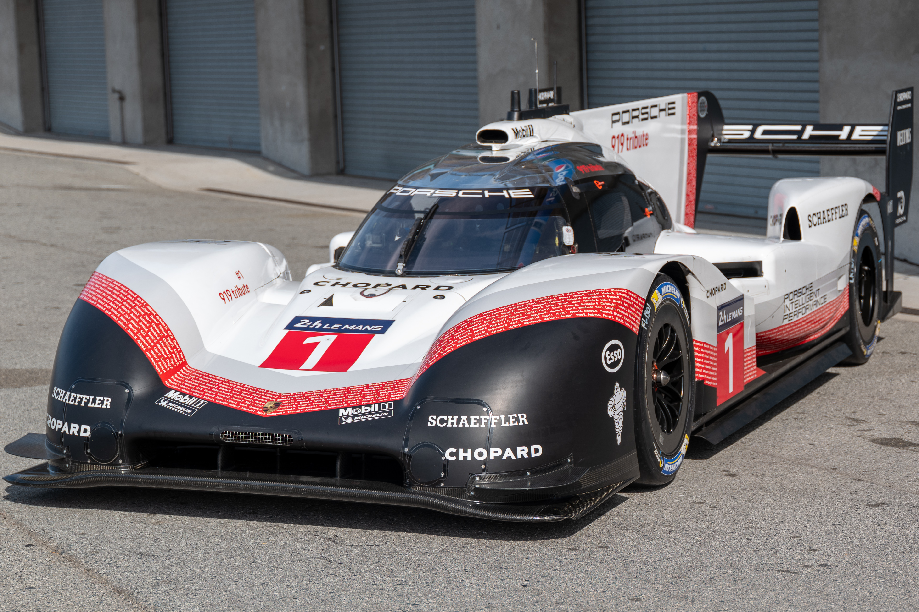 Rennsport Reunion VI